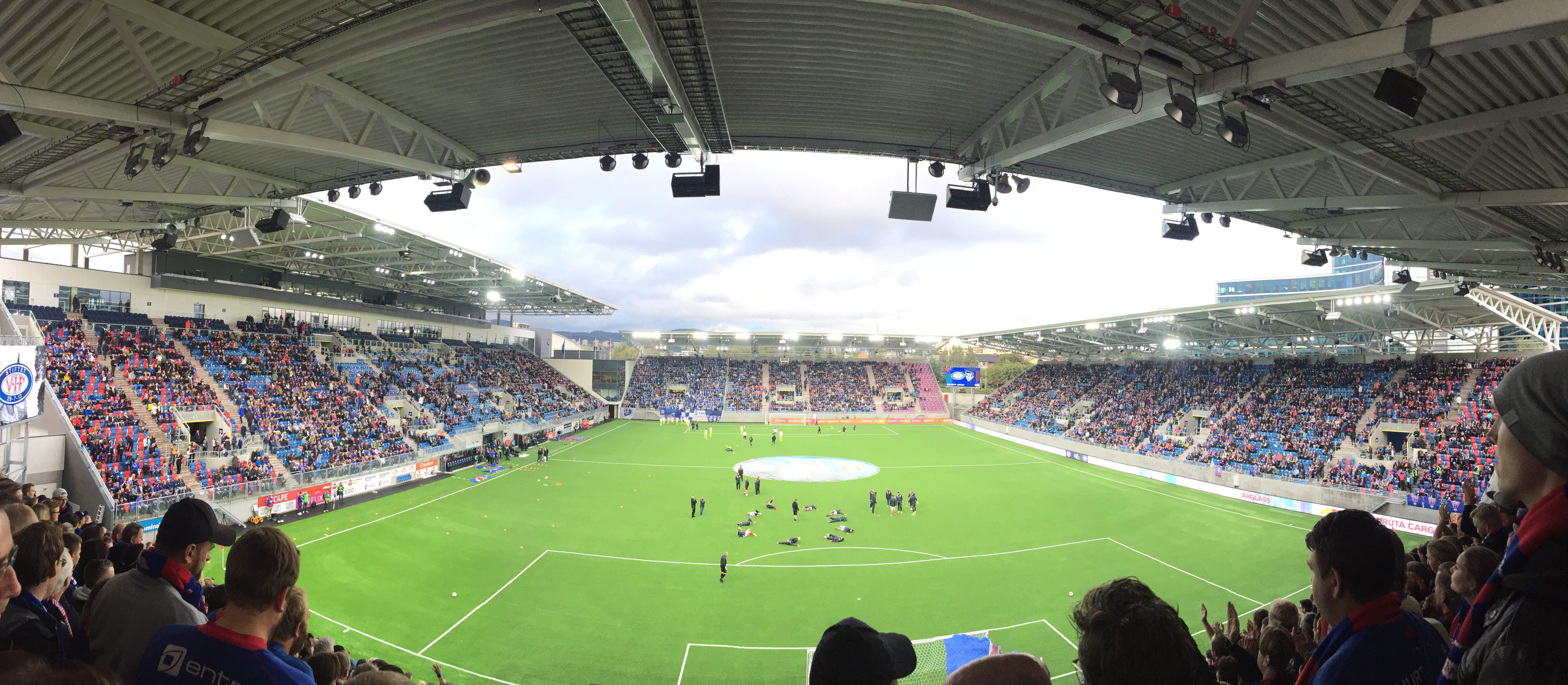 Vålerenga kultur- og idrettspark. Fra VIFs hjemmekamp mot Sarpsborg 08.